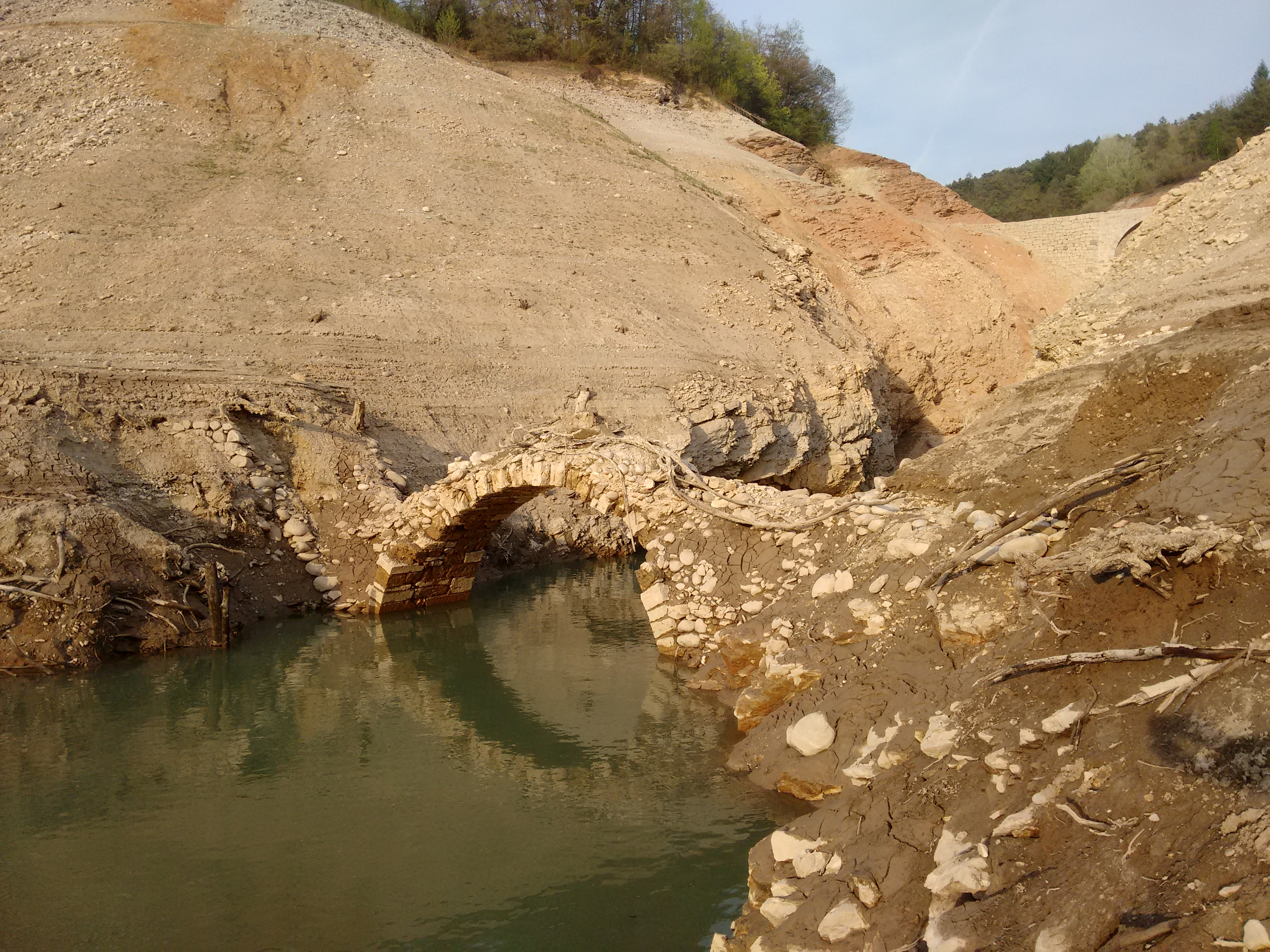 Ponte medievale detto "della Mula" che attraversa il rio San Romedio sul lato sinistro orografico del lago di Santa Giustina (solitamente sommerso dalle acque). Si trova a valle del ponte ottocentesco sulla strada dei Regai.